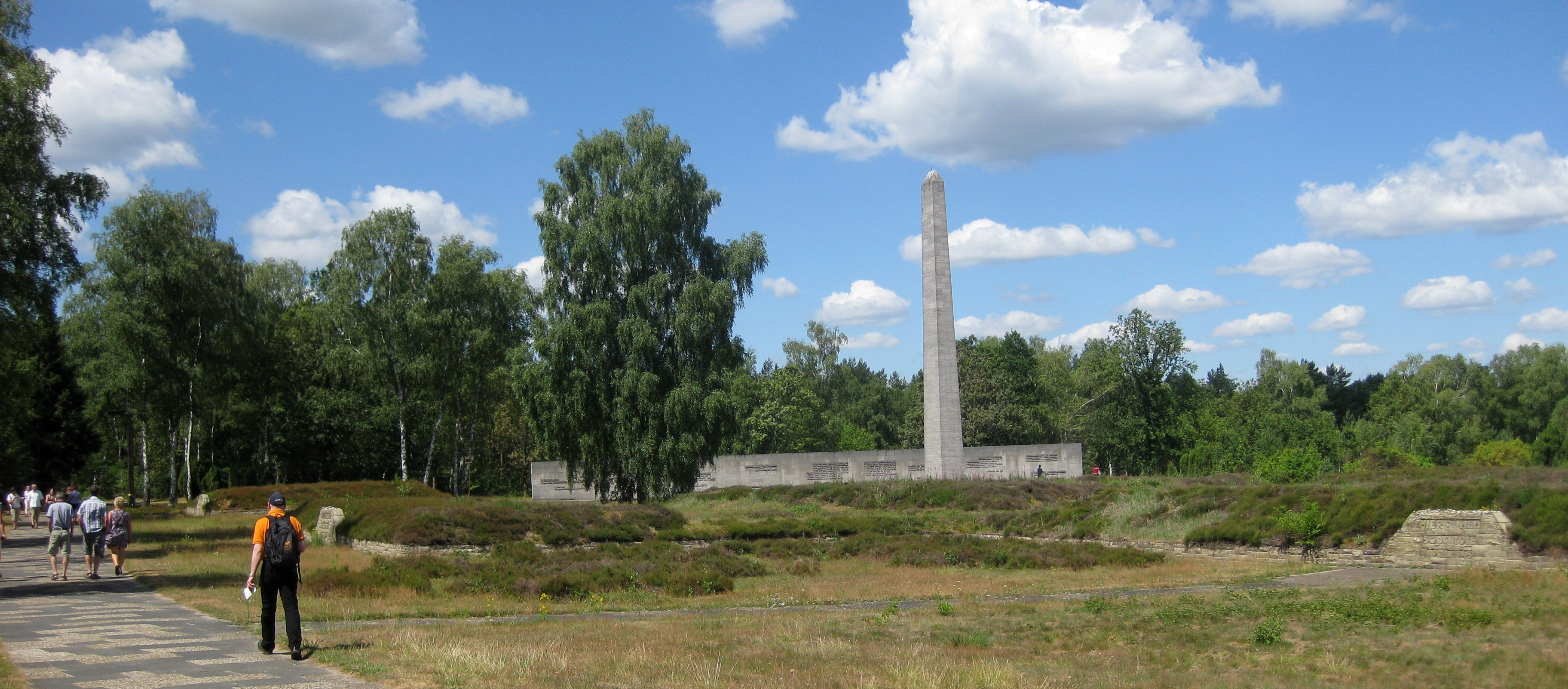 Gedenkstätte Belsen - Überblick (von links) polnisches Kreuz, Massengräber, Obelisk/Inschriftenwand